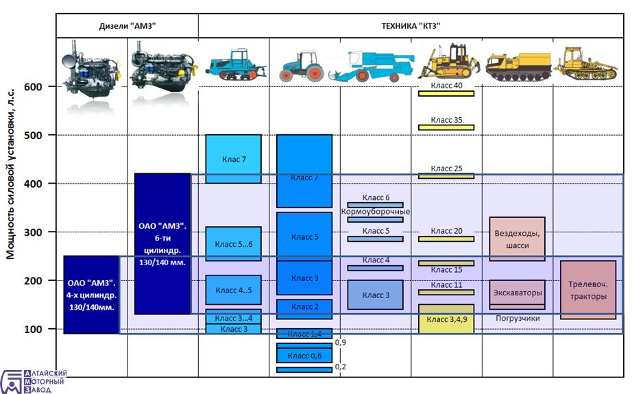 Применяемость дизелей ОАО "АМЗ" на технику концерна